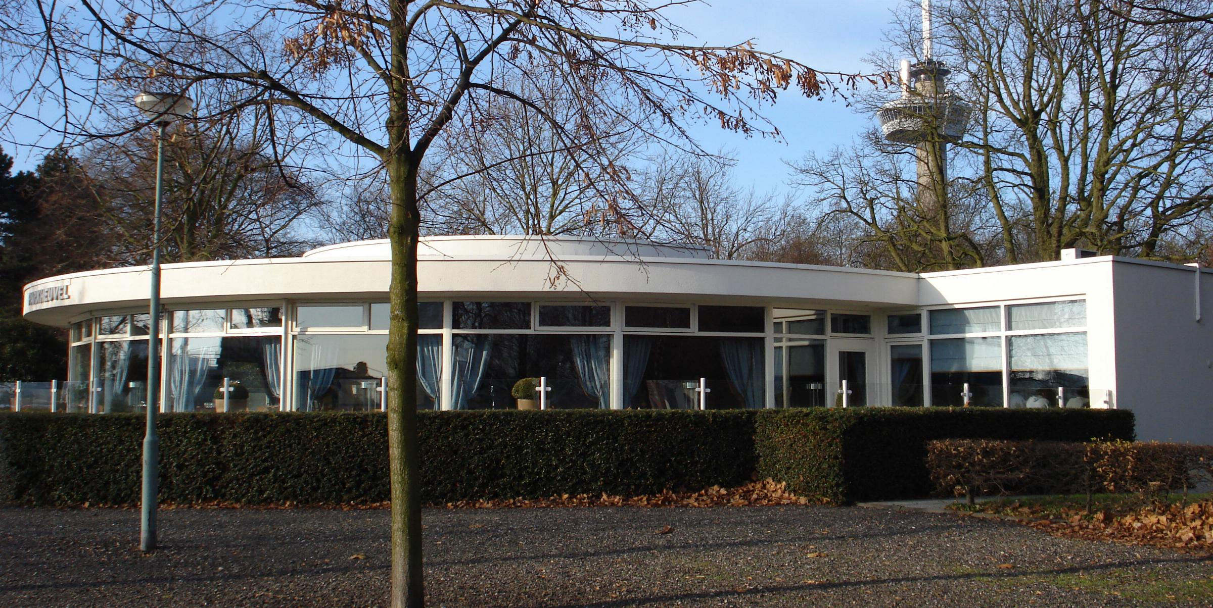 Rotterdam, Parkheuvel.